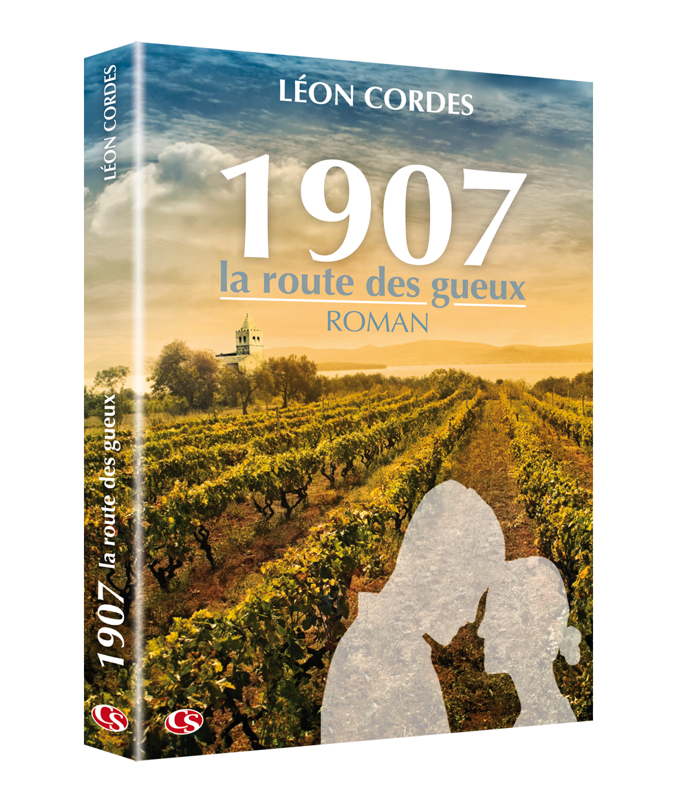 Léon Cordes, 1907 La route des gueux, éditions C. Salès.